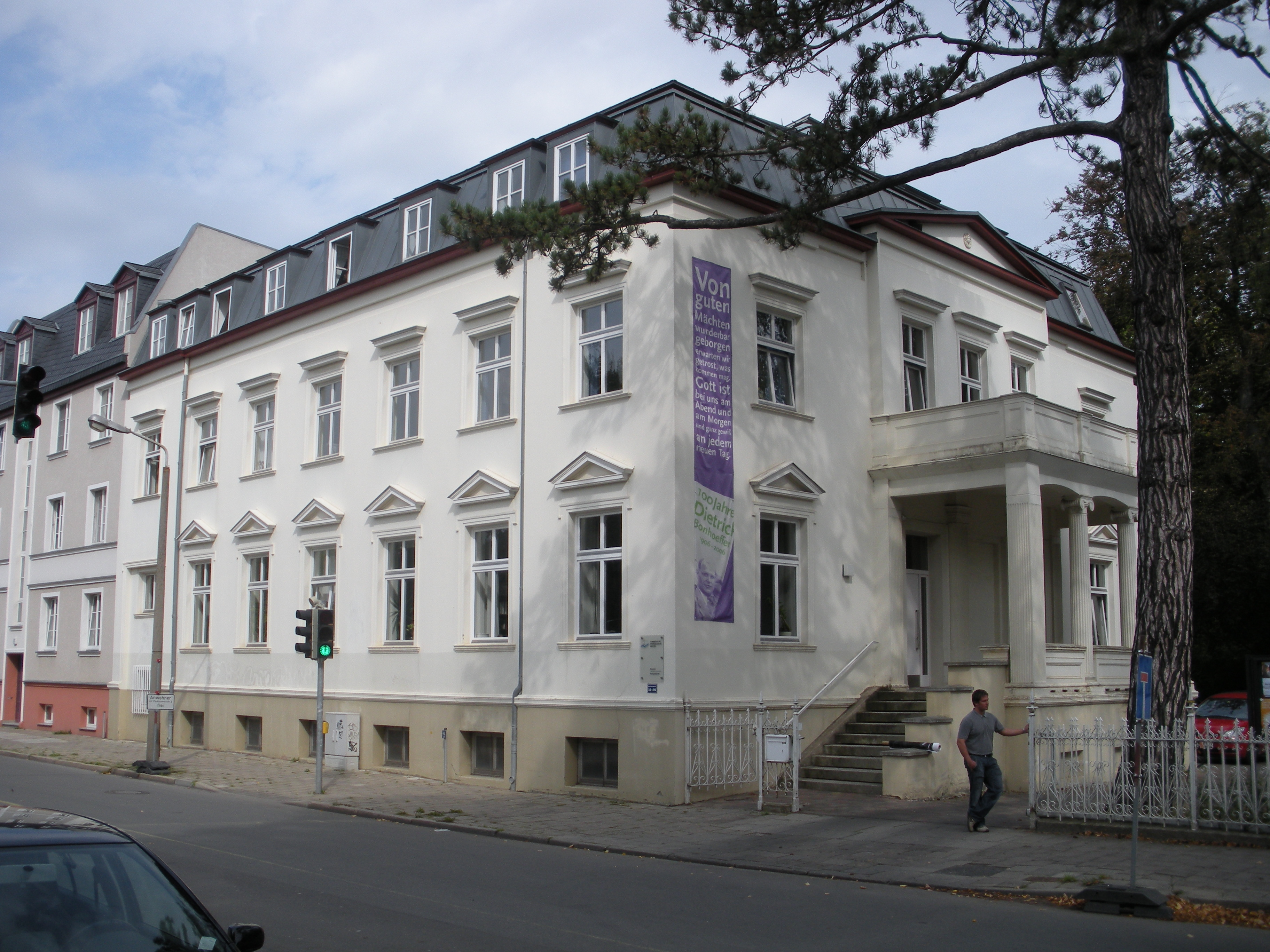 Konsistorium der Pommerschen Evangelischen Kirche in Greifswald, ex Verbindungshaus Greifswalder Sängerschaft Guilelmia